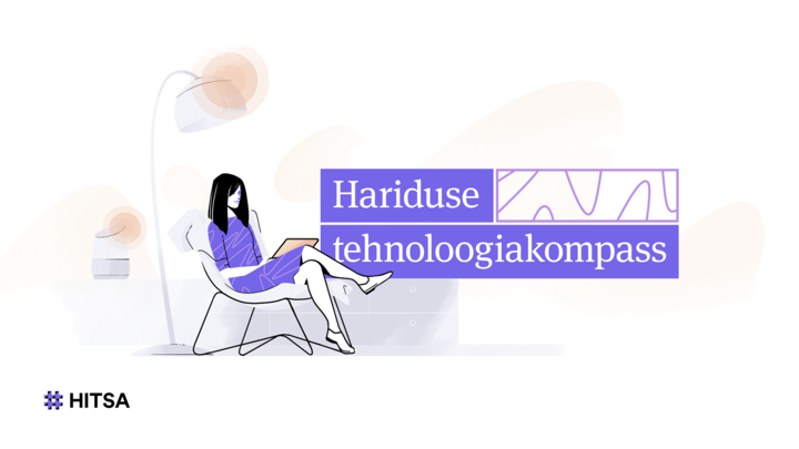 Hariduse tehnoloogiakompassi kujundus. Hariduse Infotehnooogia SA